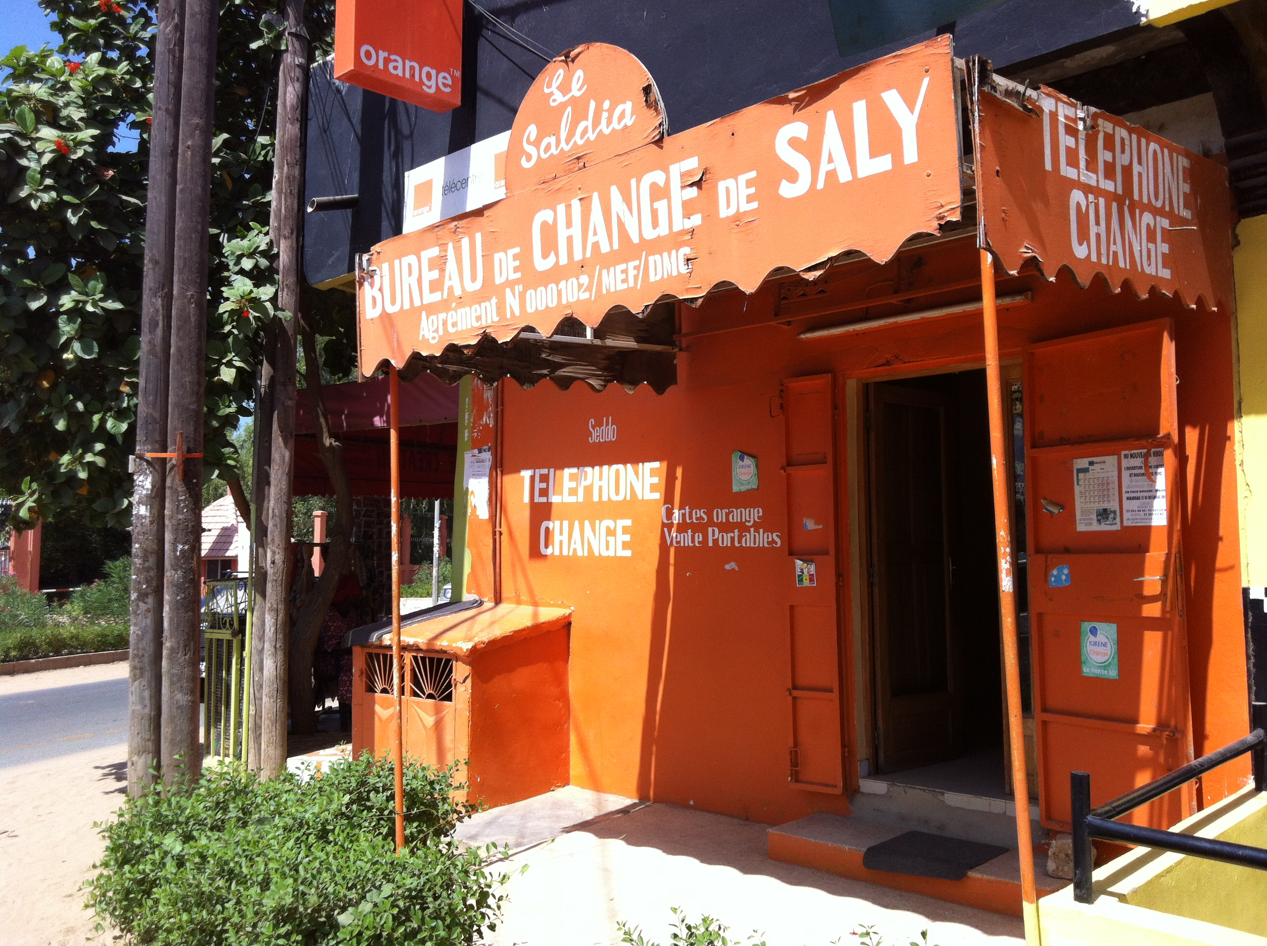 Un magasin de téléphonie orange (revendeur) à Saly, Sénégal